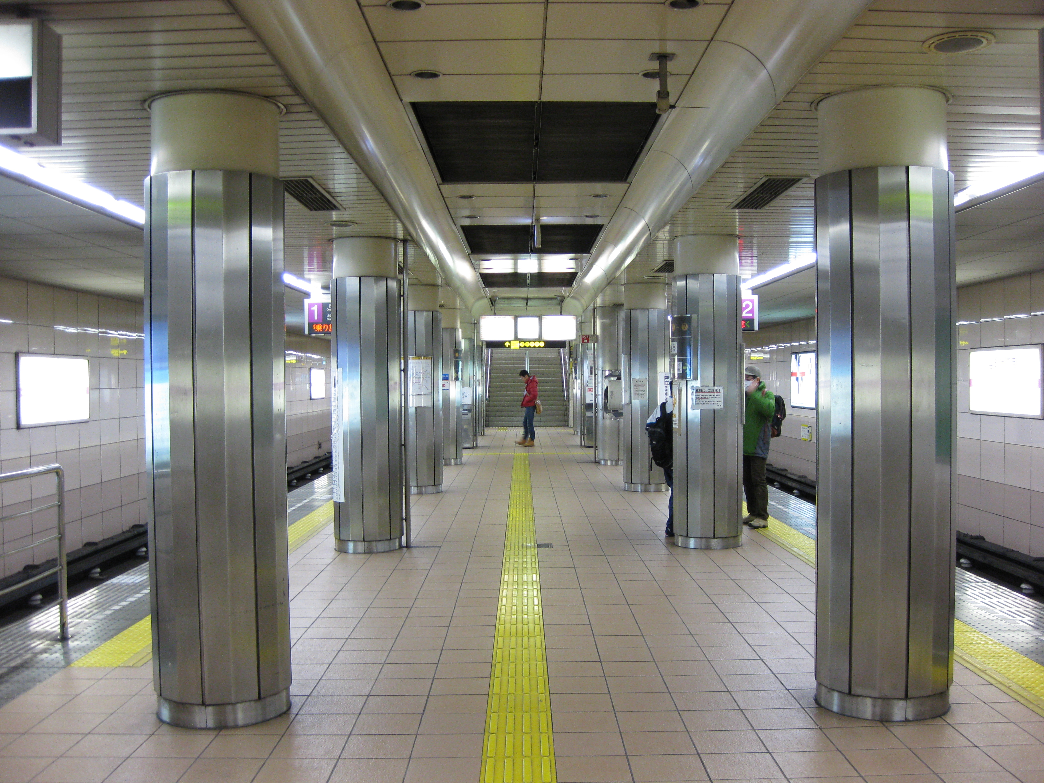 谷町六丁目駅谷町線プラットホーム